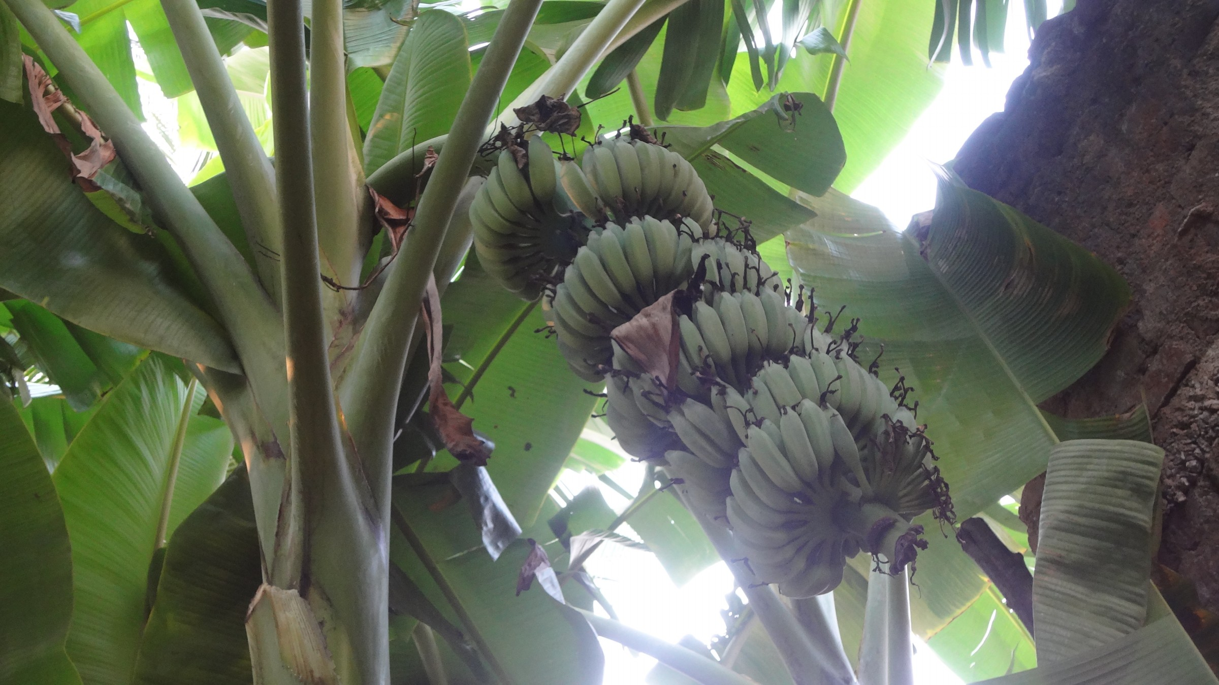 வாழைக்குலையுடன் வாழை மரம்